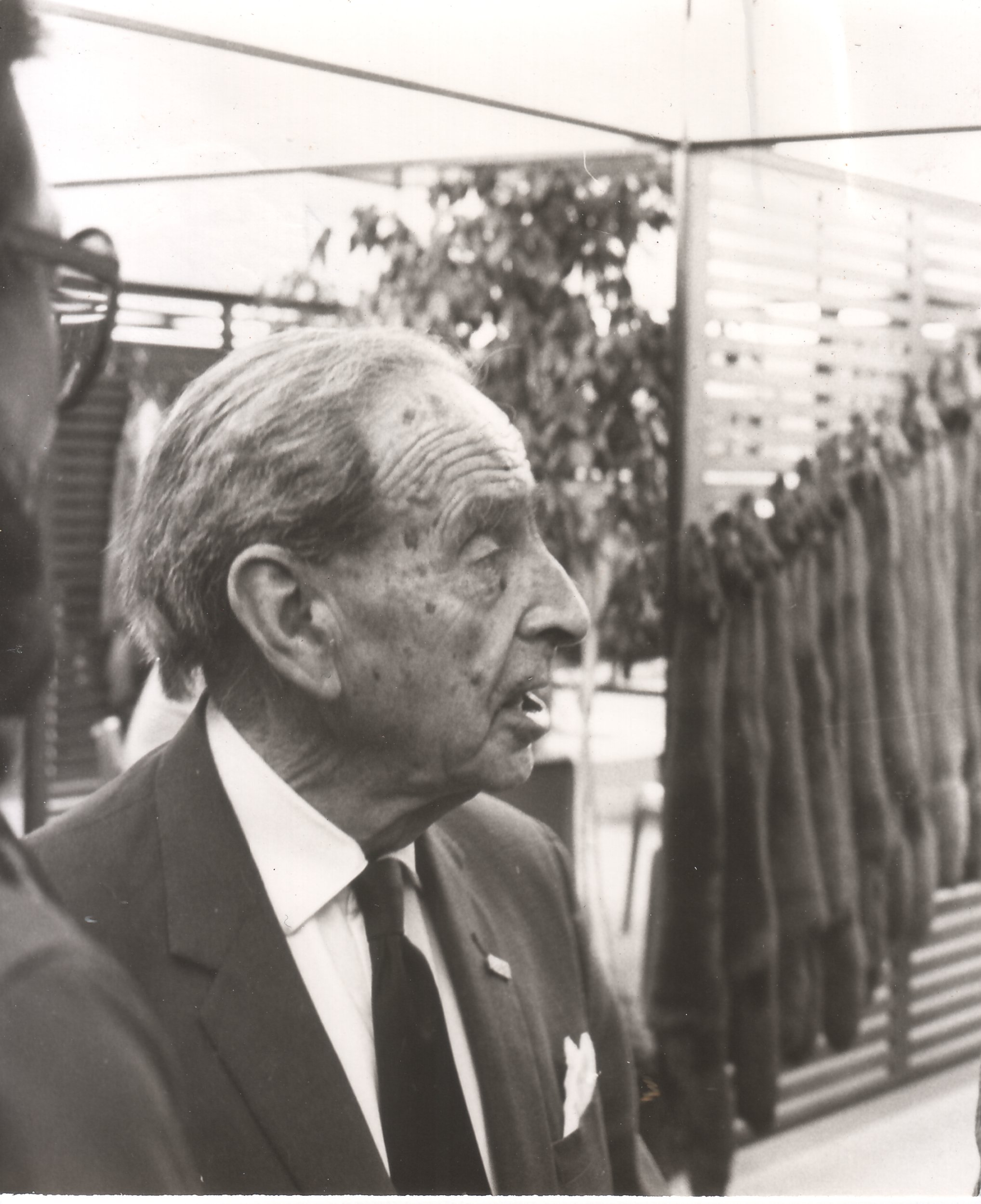 Francis Weiss (87 Jahre alt), Rauchwarenkaufmann und Autor, auf der Pelzmesse in Frankfurt am Main am Stand der Murrhardter Pelzveredlung - MPV, im Jahr 1981. Als Francis Weiss schon lange nicht mehr berufstätig war, schlug er sein Domizil regelmäßig am Stand der MPV auf, um dort Branchenkollegen zu treffen.